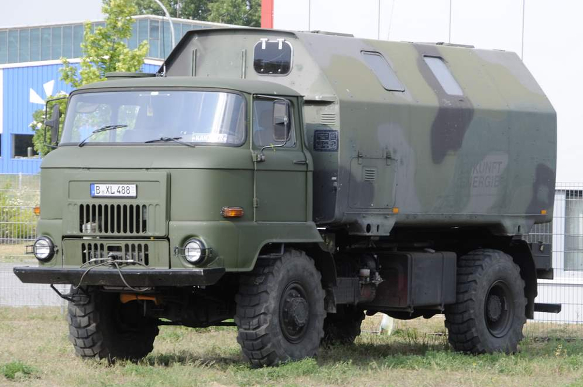 IFA L60